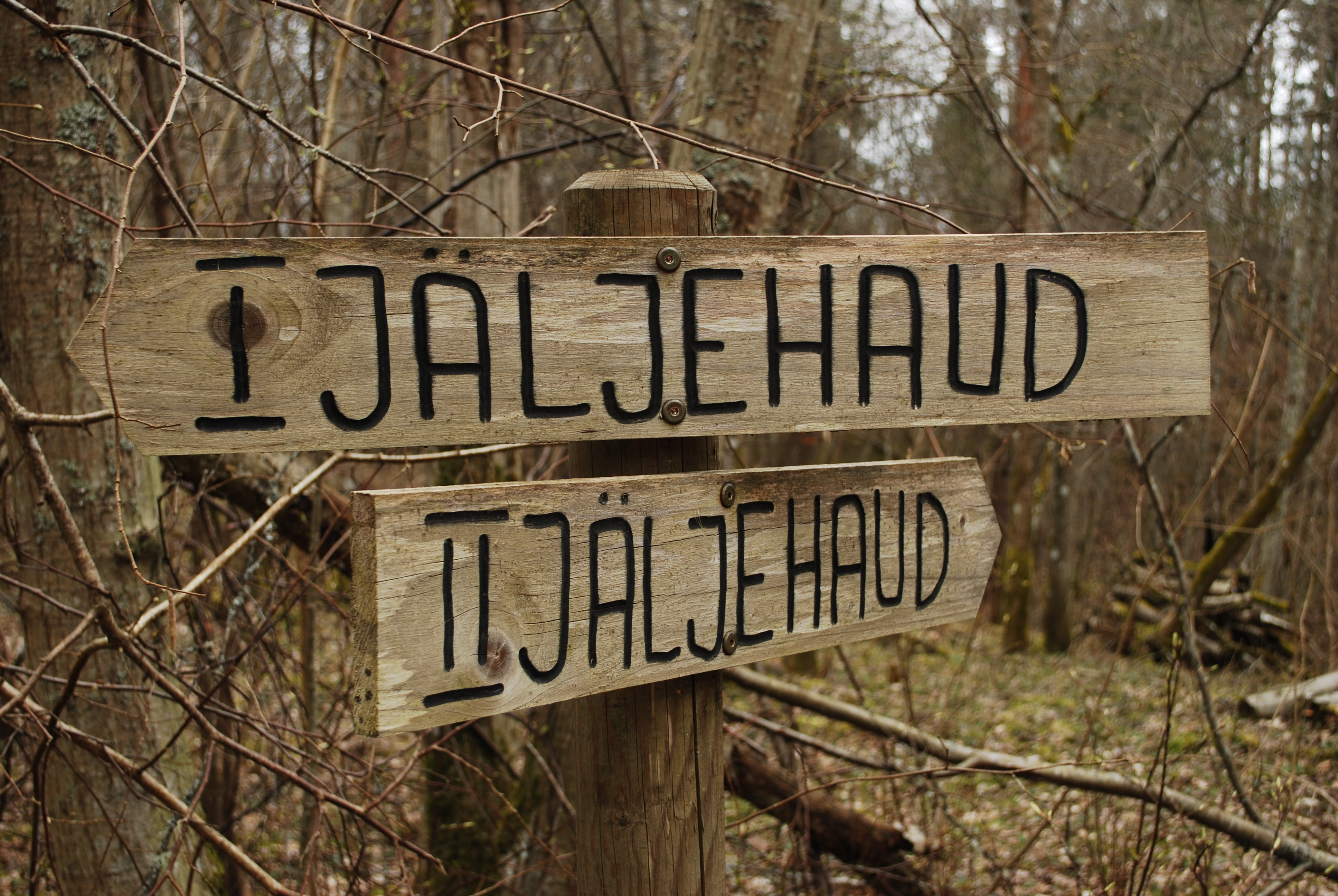 Suunaviidad Vanapagana jäljehaudadele Paganamaal, Võrumaal.